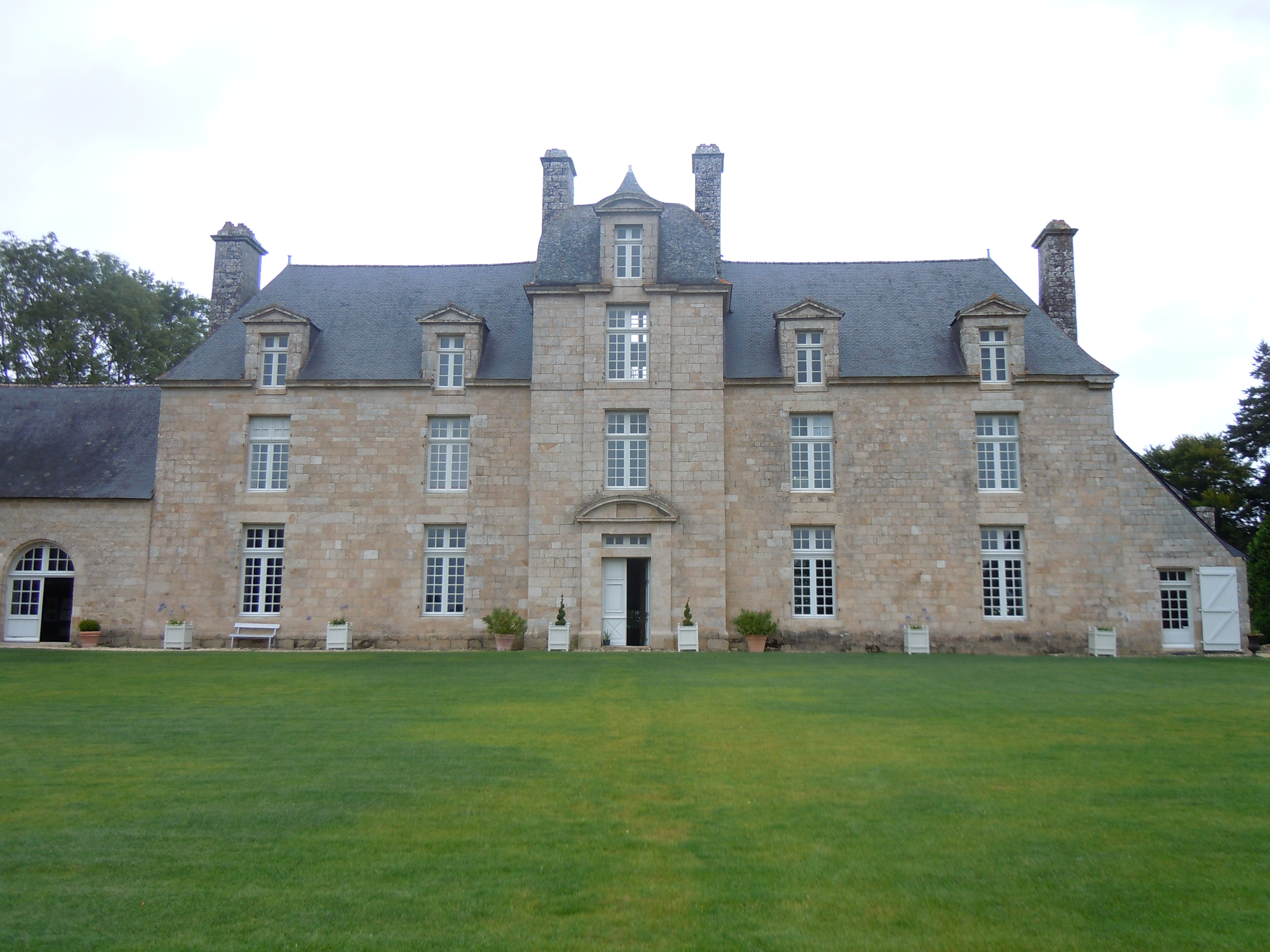 façade côté jardin du château de Coscro (commune de Lignol, département du Morbihan)